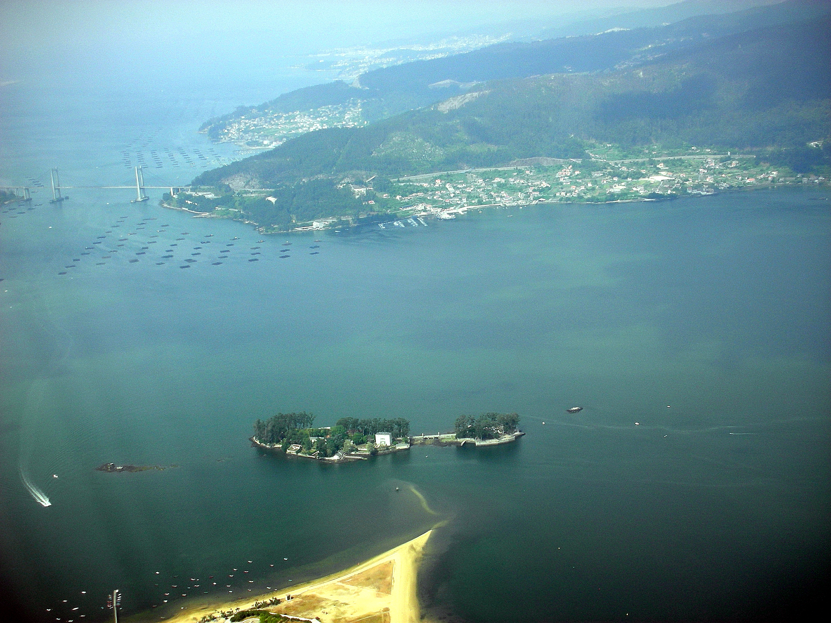 Illa de San Simón, na Ría de Vigo-Galicia'Vista aérea da ría de Vigo'